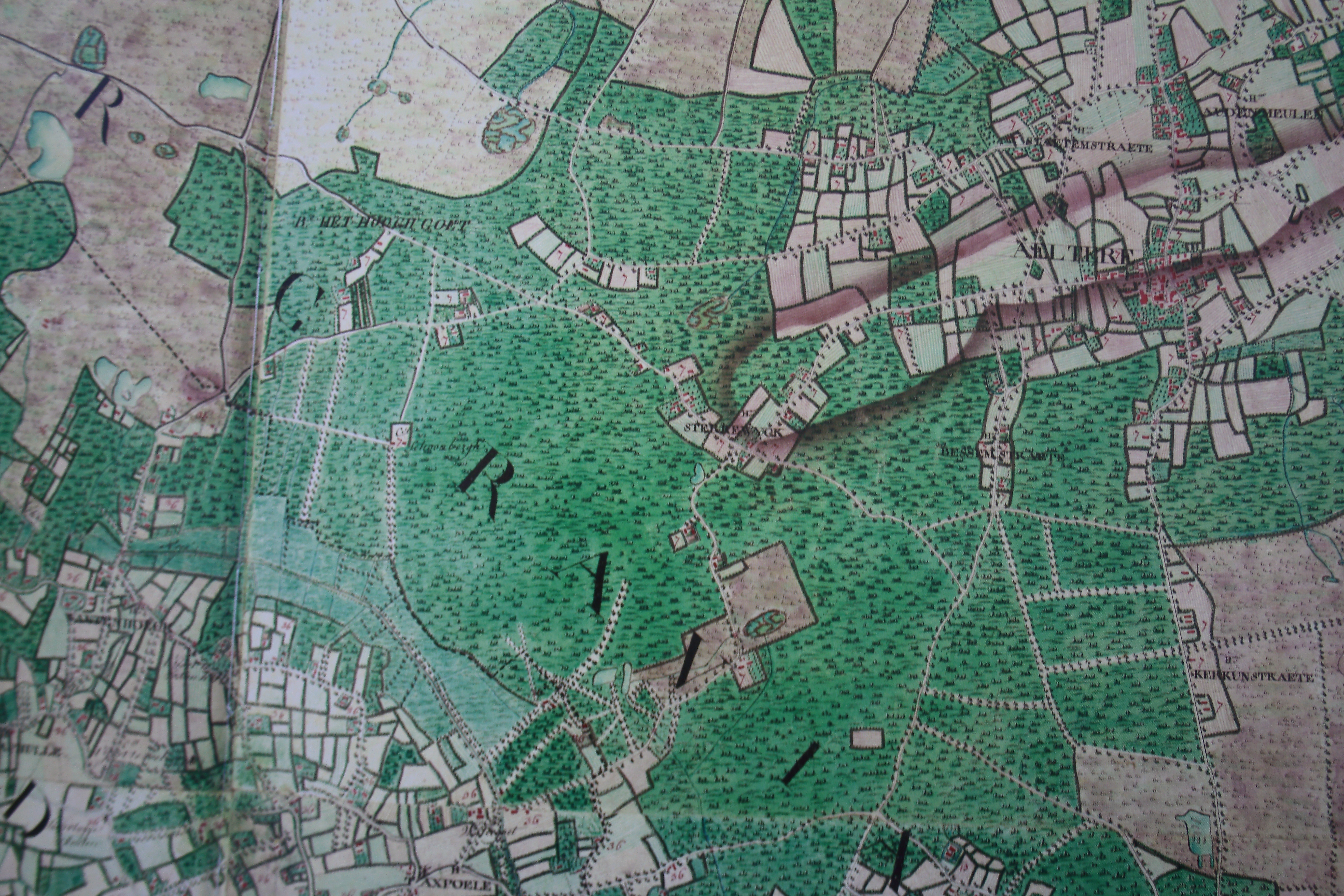 Hooggoed, Ferrariskaart